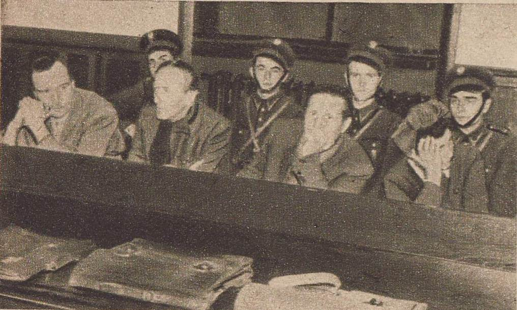 Process (od lewej) Wandy Szczepańskiej, Stefana Golczewskiego, Juliusza Łuszczewskiego i Michała Plucińskiego za ich role w hitlerowskim filmie Heimkehr (Powrót do ojczyzny).